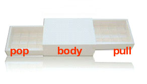 Aufbau des Schiebeprinzips eines Burgopaks